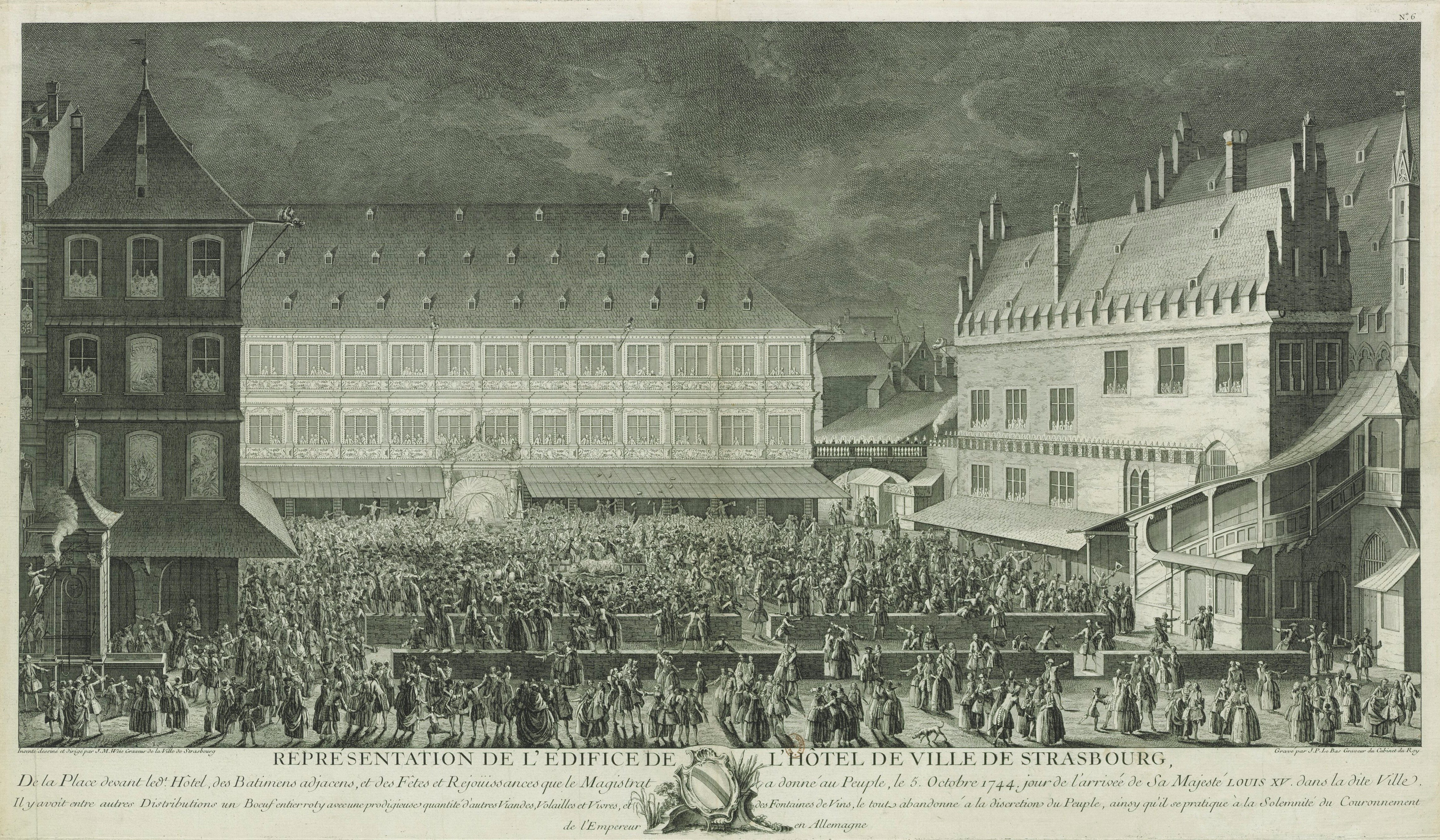 Représentation de l'édifice de l'hotel de ville de Strasbourg, de la place devant le d.t hotel, des bâtimens adjacens, et des fêtes et réjouissances que le magistrat a donné au peuple le 5 octobre 1744, jour de l'arrivée de Sa Majesté Louis XV dans la dite ville, estampe.